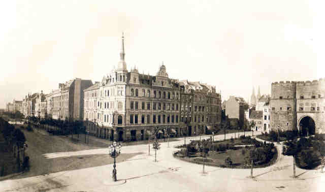 Tuschzeichnung Kölner Ringe